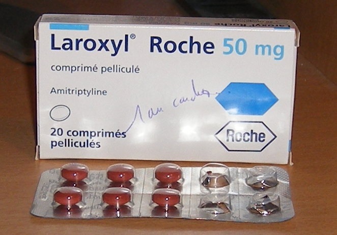 boîte de Laroxyl Roche 50 mg Amitiptyline